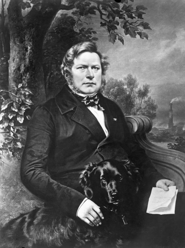 Title: August Borsig Extra information: Gemälde August Borsig (von Franz Krüger aus dem Jahr 1855 ?) People in the image: Borsig, August von: Gründer der Borsig-Werke, Deutschland Factual corrections and alternative descriptions are encouraged separately from the original description. Additionally errors can be reported at this page to inform the Bundesarchiv. Original historic description: Die weltbekannten Borsigwerke insolvent! und haben ihre Zahlungen einstellen müssen. Aus kleinsten Anfängen heraus hat sich die bekannte Maschinenfabrik zur Weltfirma empor gearbeitet und über 90 Jahre erfolgreich geschaffen. Bekannt war der Borsig-Lokomotivbau. Der Begründer der weltbekannten Borsigwerke, August Borsig, gestorben im Jahre 1854. August Borsig, Unternehmer, Preußen, Deutschland (GND 118661981) August Borsig, German (Prussian) businessman, founder of the Borsig factories